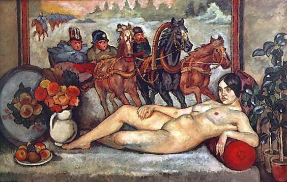 Илья Машков. "Русская Венера". 1914